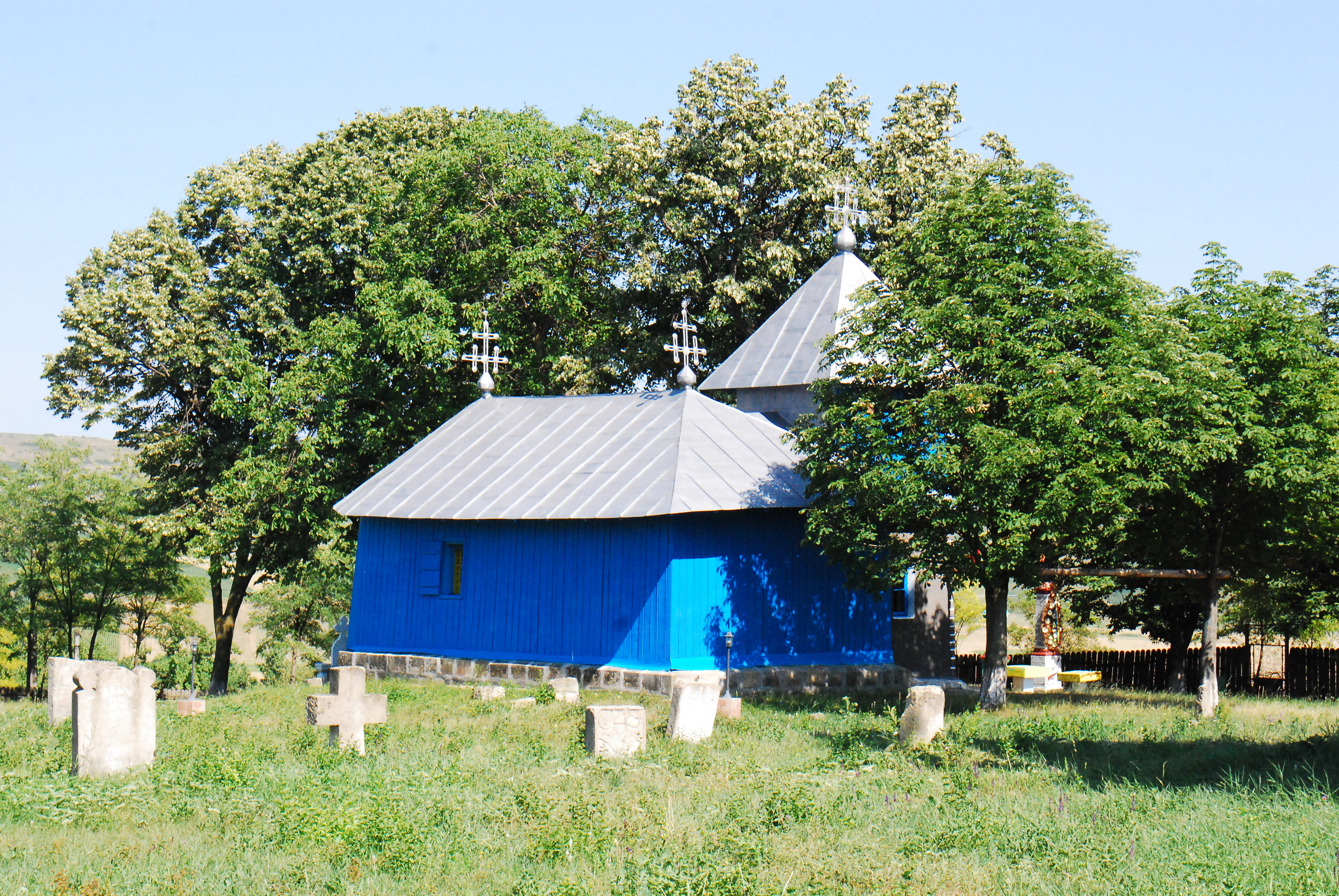 Biserica "Sf. Treime"